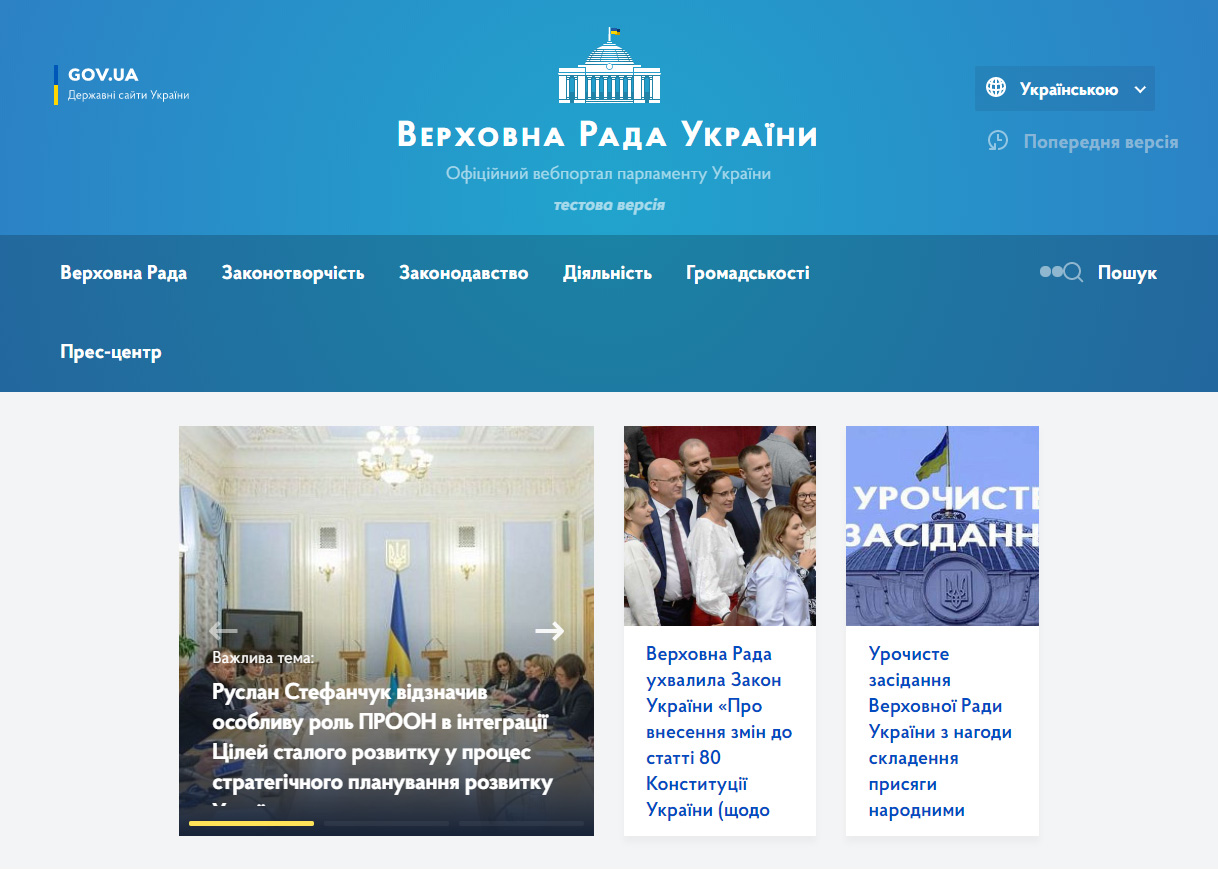 Знімок екрану сайту Верховної Ради України, тестова версія, 14.11.2019 р.